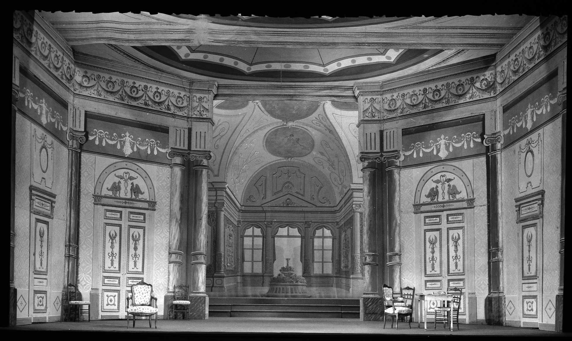 Théâtre du Capitole. Le 26 Avril 1968. Vue du décor de Véronique au théâtre du Capitole.